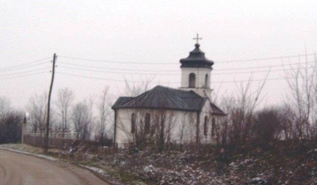 Црква у Шарбану